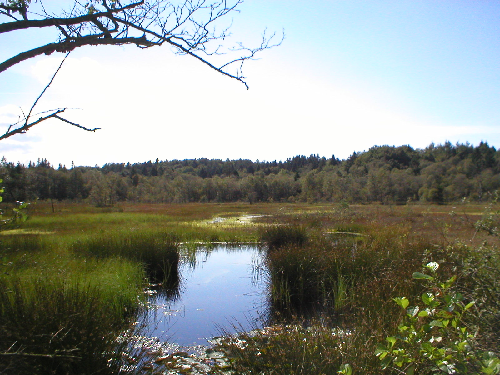 Das Butschimoor (auch Budschimoor geschrieben) im Naturschutzgebiet „Fröruper Berge“